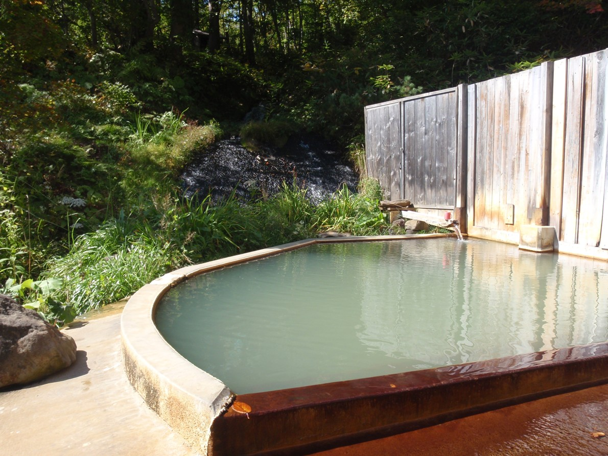 北海道蘭越町ニセコ昆布温泉の鯉川温泉旅館露天風呂